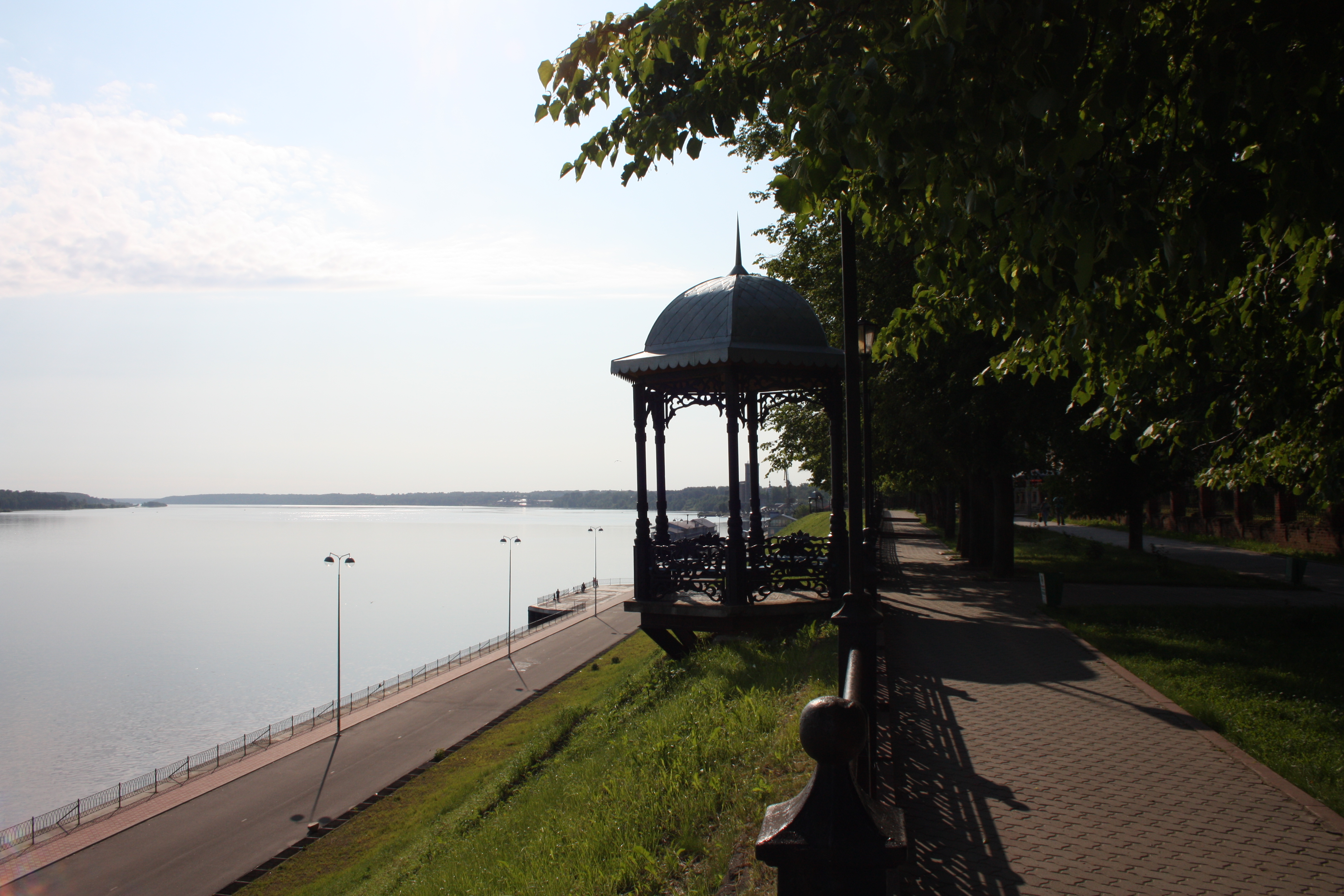 Волжский бульвар (Кинешма)